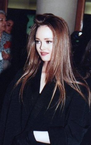 Vanessa Paradis à la cérémonie des Césars.